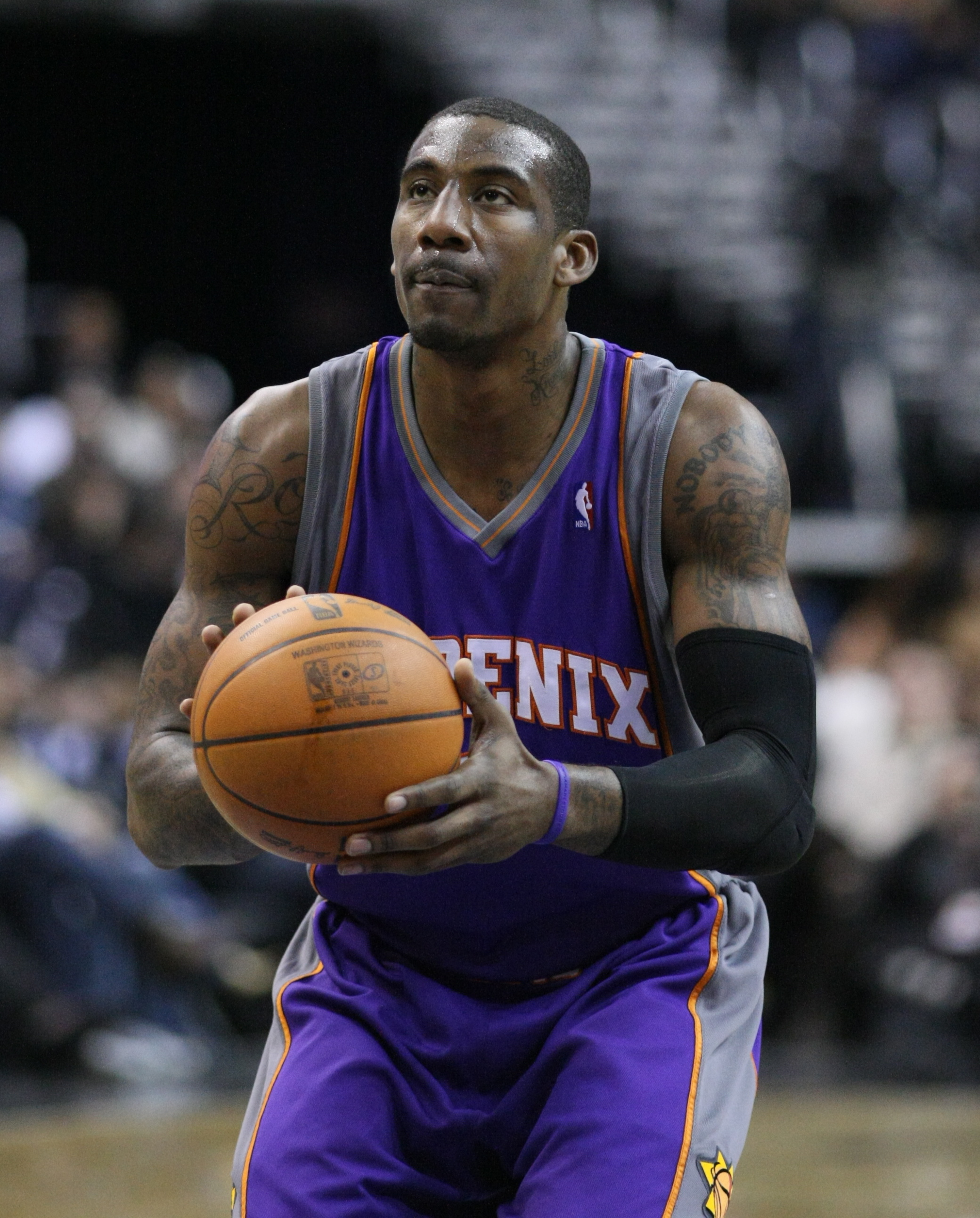 El jugador norteamericano Amare Stoudemire realizando un tiro libre.